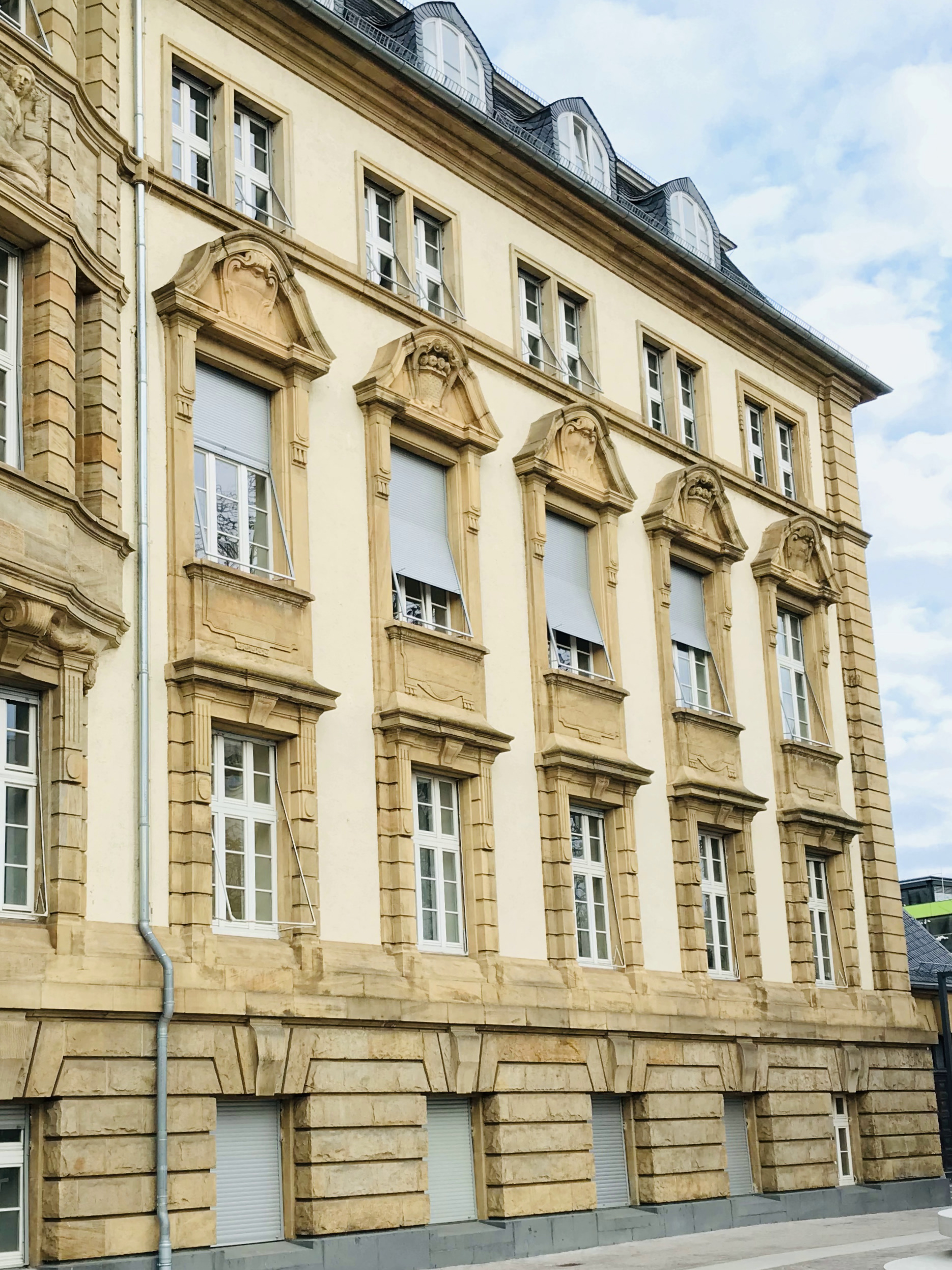 Westseite des Instituts für Praktische Mathematik (IPM) der TH Darmstadt im dritten Stock im alten Hauptgebäude der TH Darmstadt